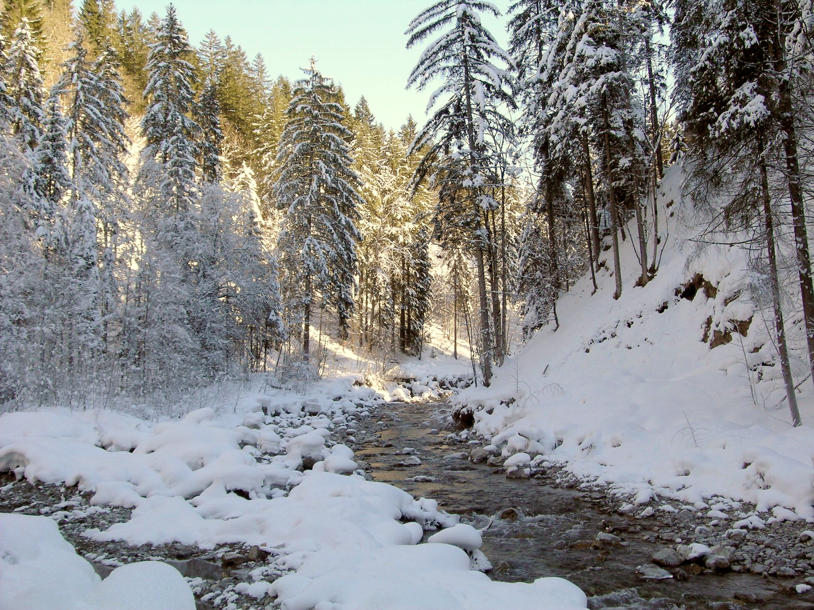 Das Oytal mit dem Oybach nahe Gruben, im Winter 2006